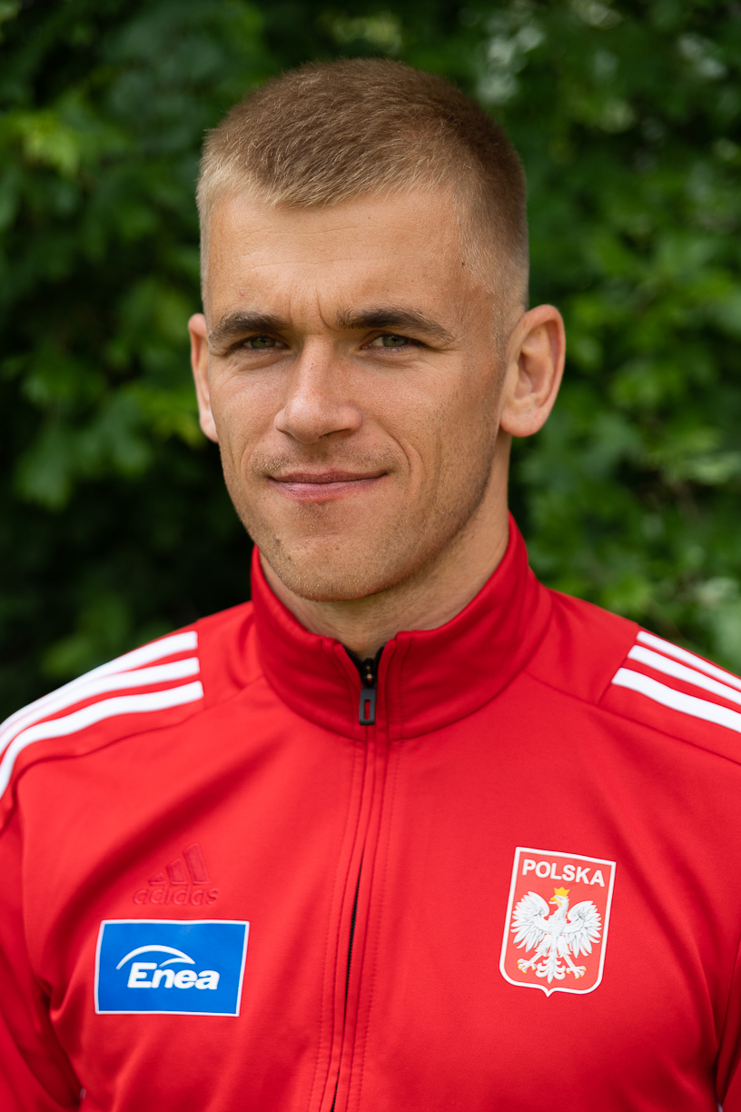 Polski wioślarz Michał Szpakowski w 2019